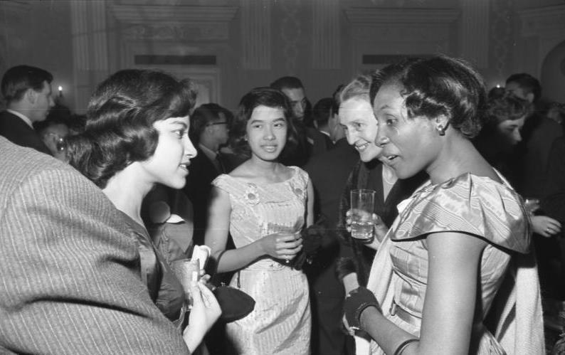 Deutscher Akademischer Austauschdienst gibt Empfang in der "Redoute"